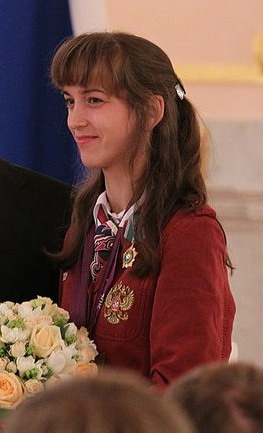 Елена Иванова